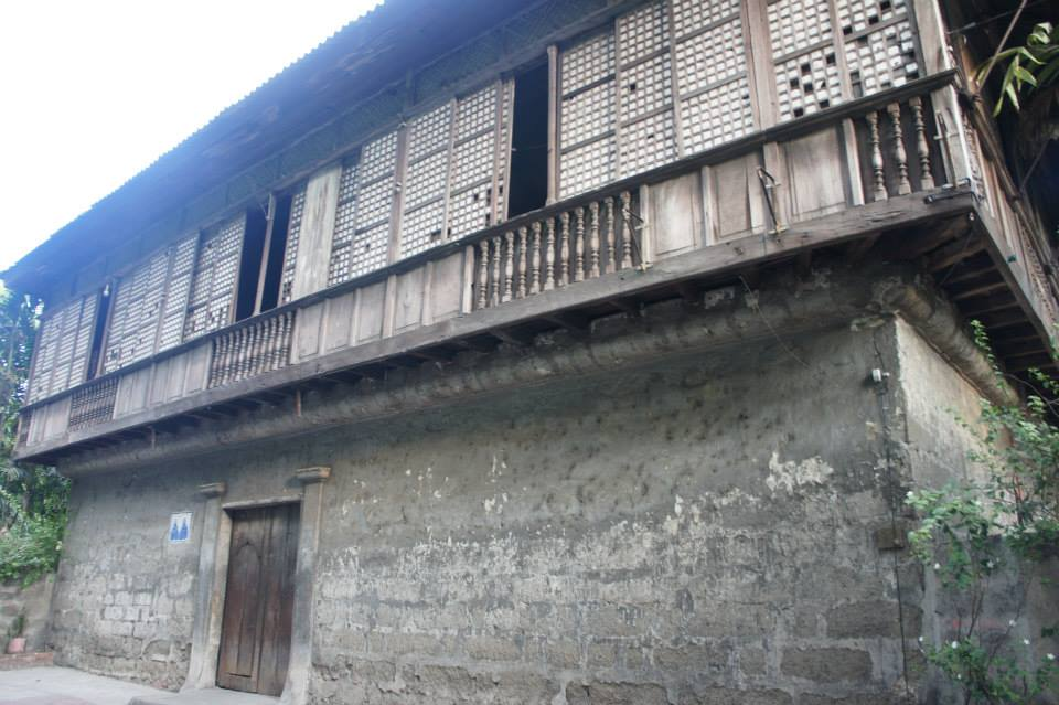 Bahay na Tisa